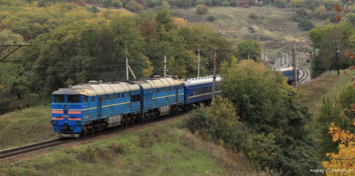 КР Днепропетровский ТРЗ 09.2006 г.